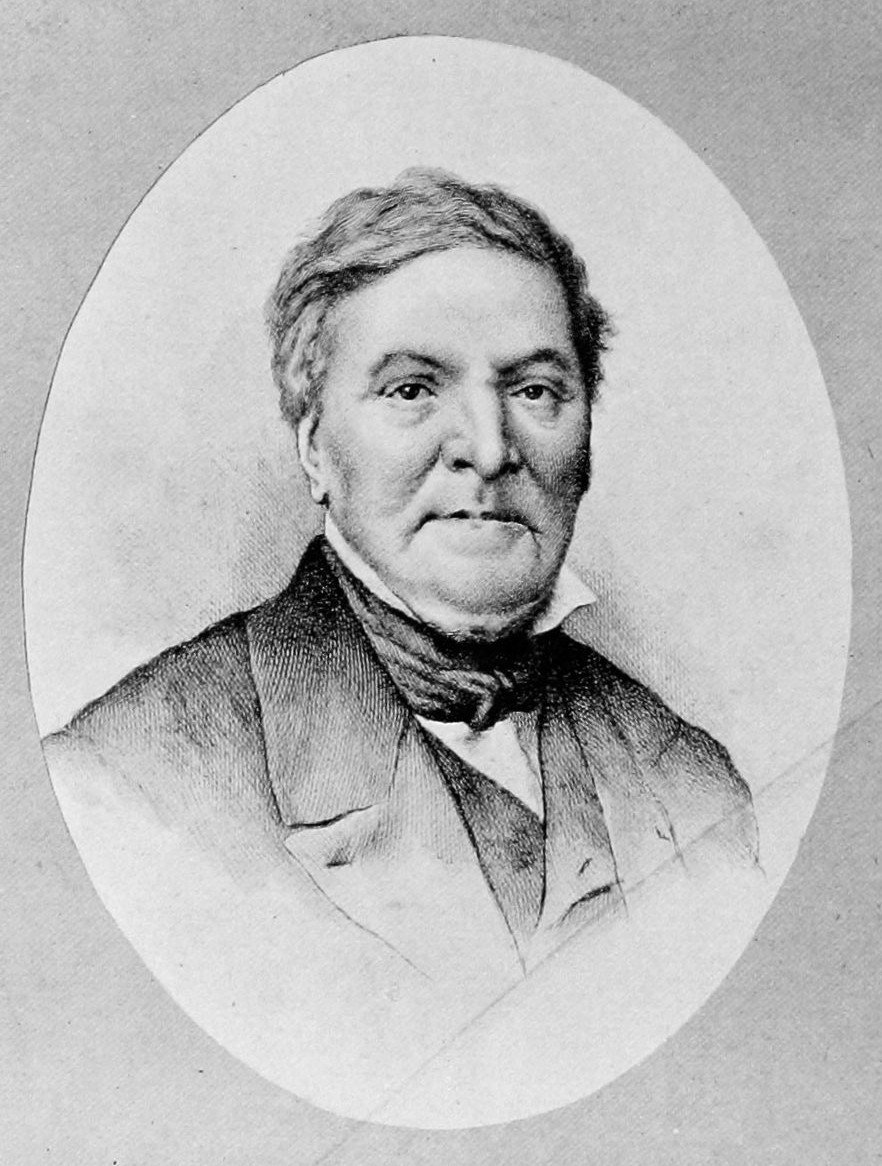 Lyon artistique. Architectes : notices biographiques et bibliographiques avec une table des édifices et la liste chronologique des noms / par E.-L.-G. Charvet.